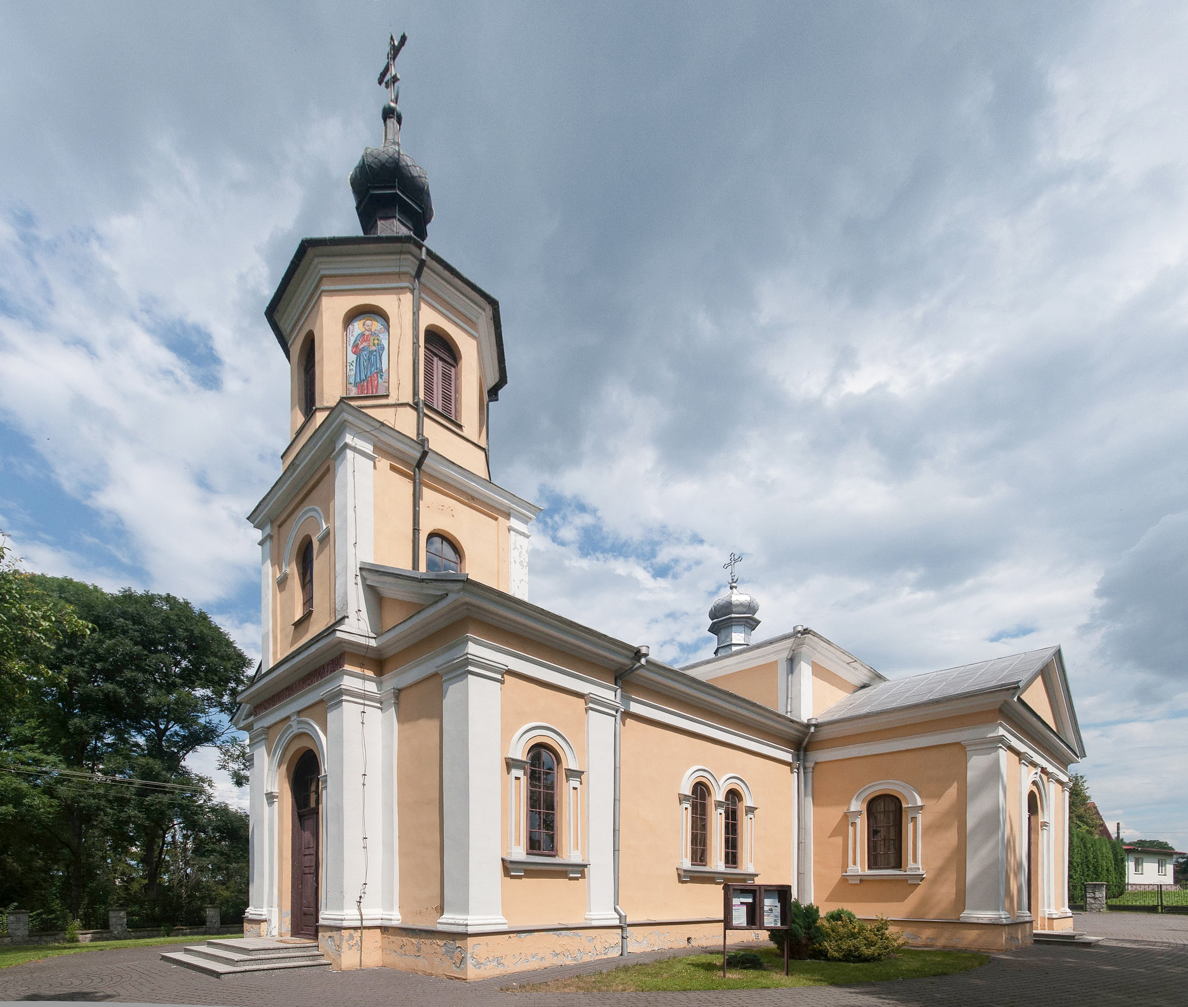 Tarnogród, cerkiew prawosławna p.w. św. Jerzego, 1870-1875